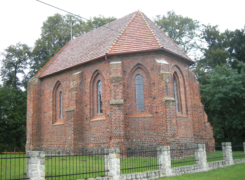 Gotycki kościół w Ziemiełowicach